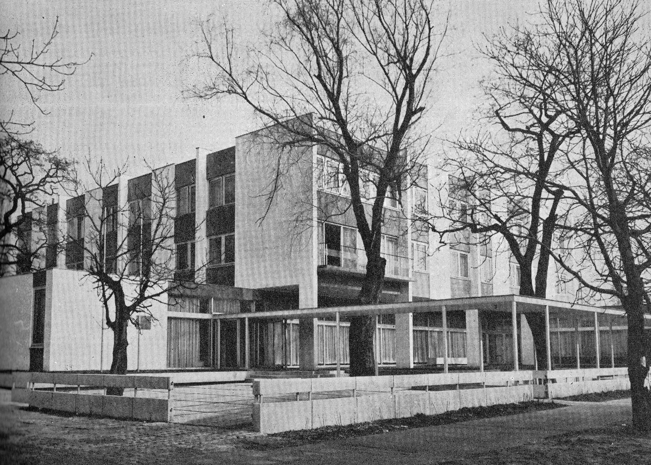 Węgierska ekspozytura Handlowa przy ul. Szwoleżerów w Warszawie